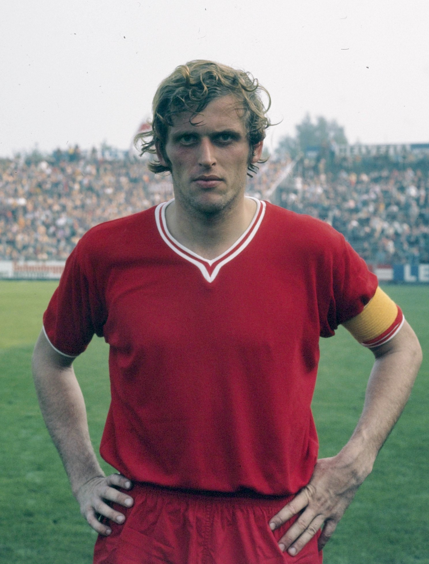 Voetbal; Keizer